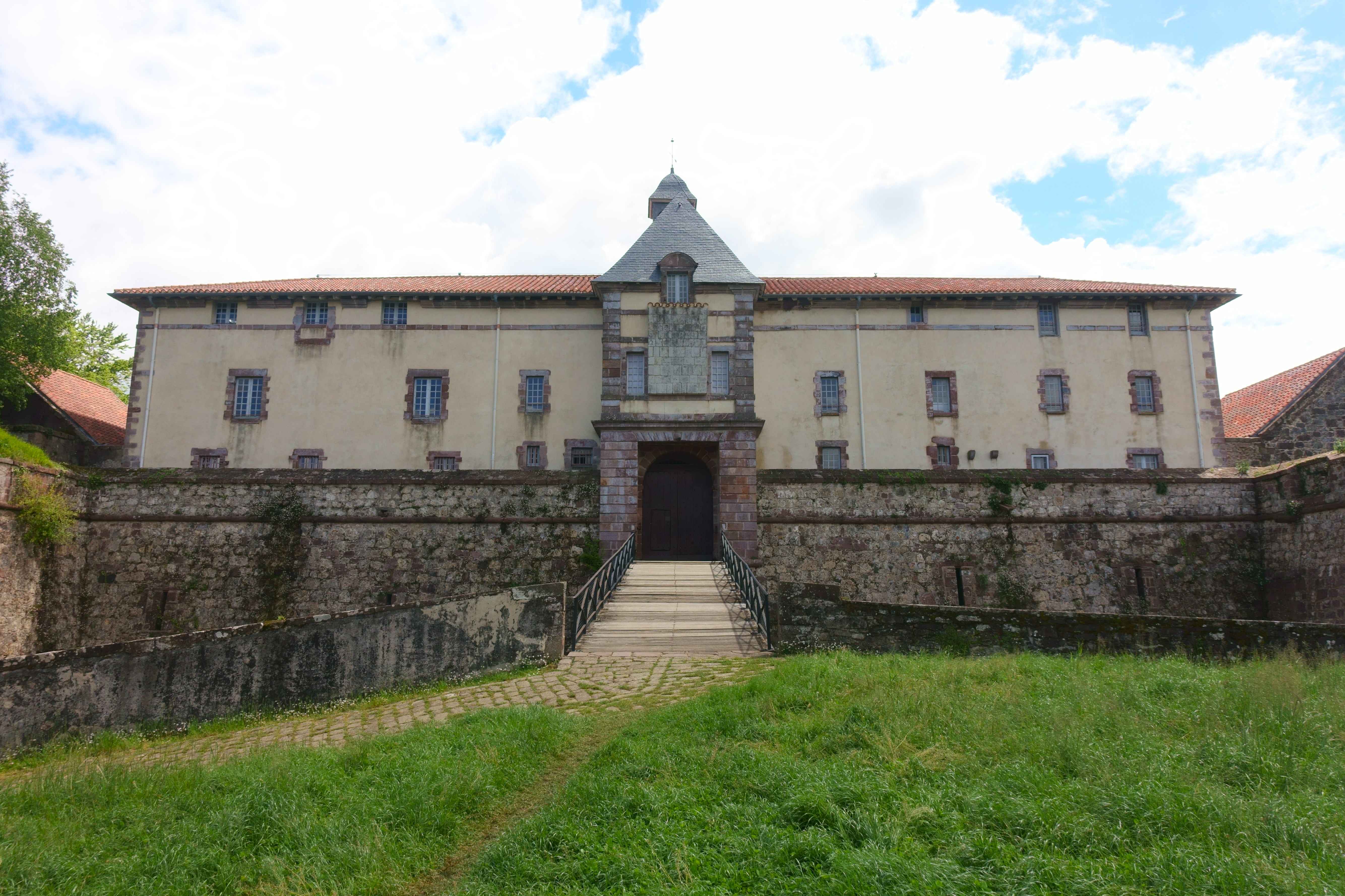 Ciudadela de San Juan Pie de Puerto (Pirineos Atlánticos, Francia).